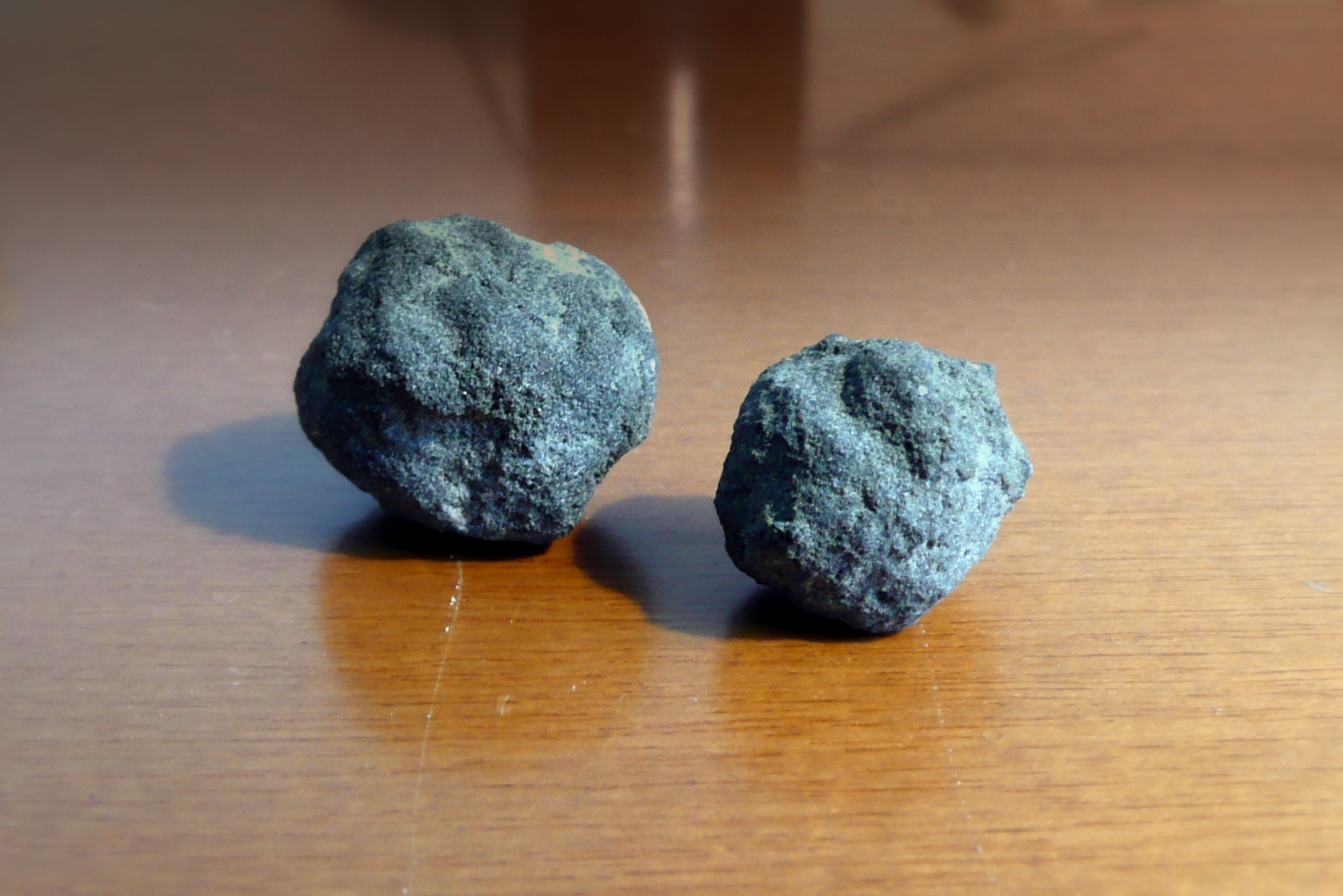 Due piccole sfere di clinker.